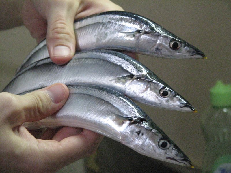 Grasping Pacific sauries